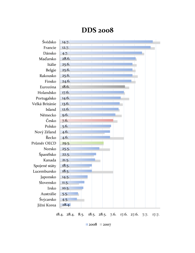 Den daňové svobody 2008 ve světě